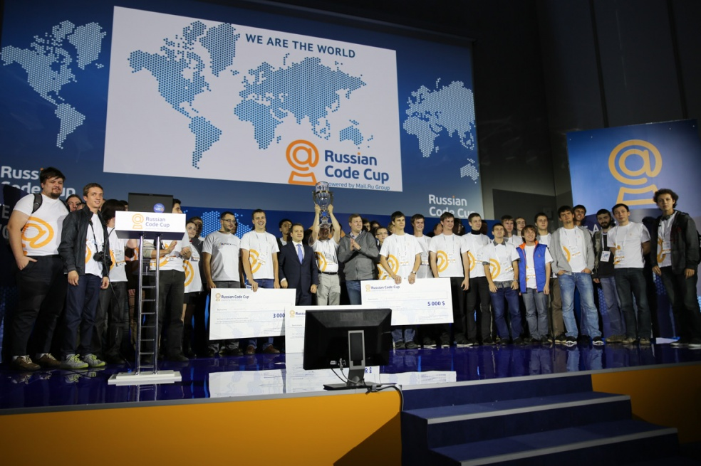 Финал чемпионата по спортивному программированию Russian Code Cup 2013